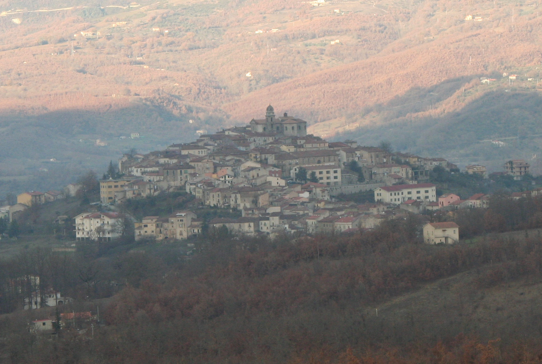 Foto (C) by Pinassi "O-Zone" Michele. La foto rappresenta il paese di Spinoso (PZ) scattata in Dicembre 2006 dalle pendici del monte Raparo. Scattata con una Canon EOS 350D obiettivo Canon EF 35-135 3.5-5.